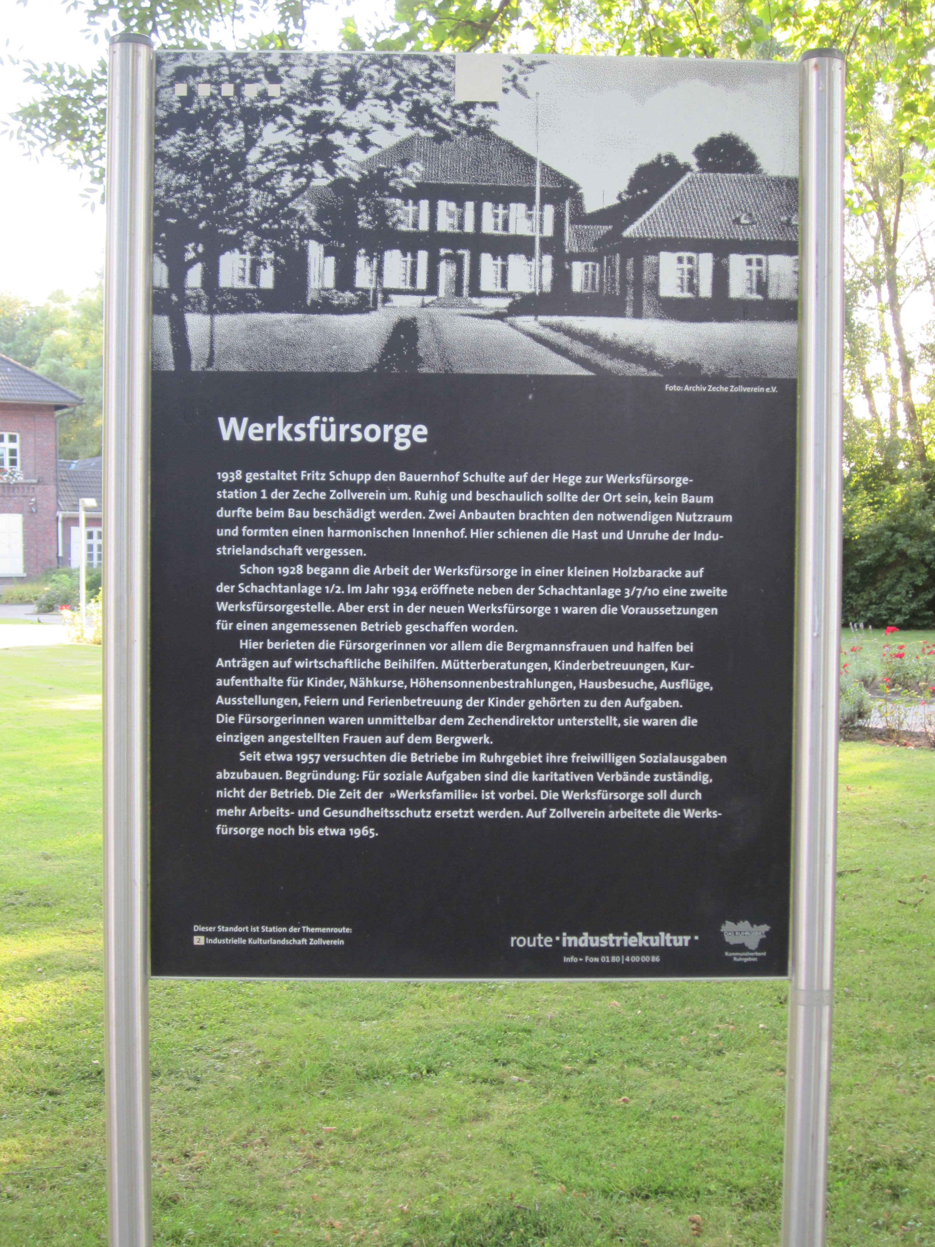 Informationstafel der Werkfürsorge Zollverein in Essen-Katernberg